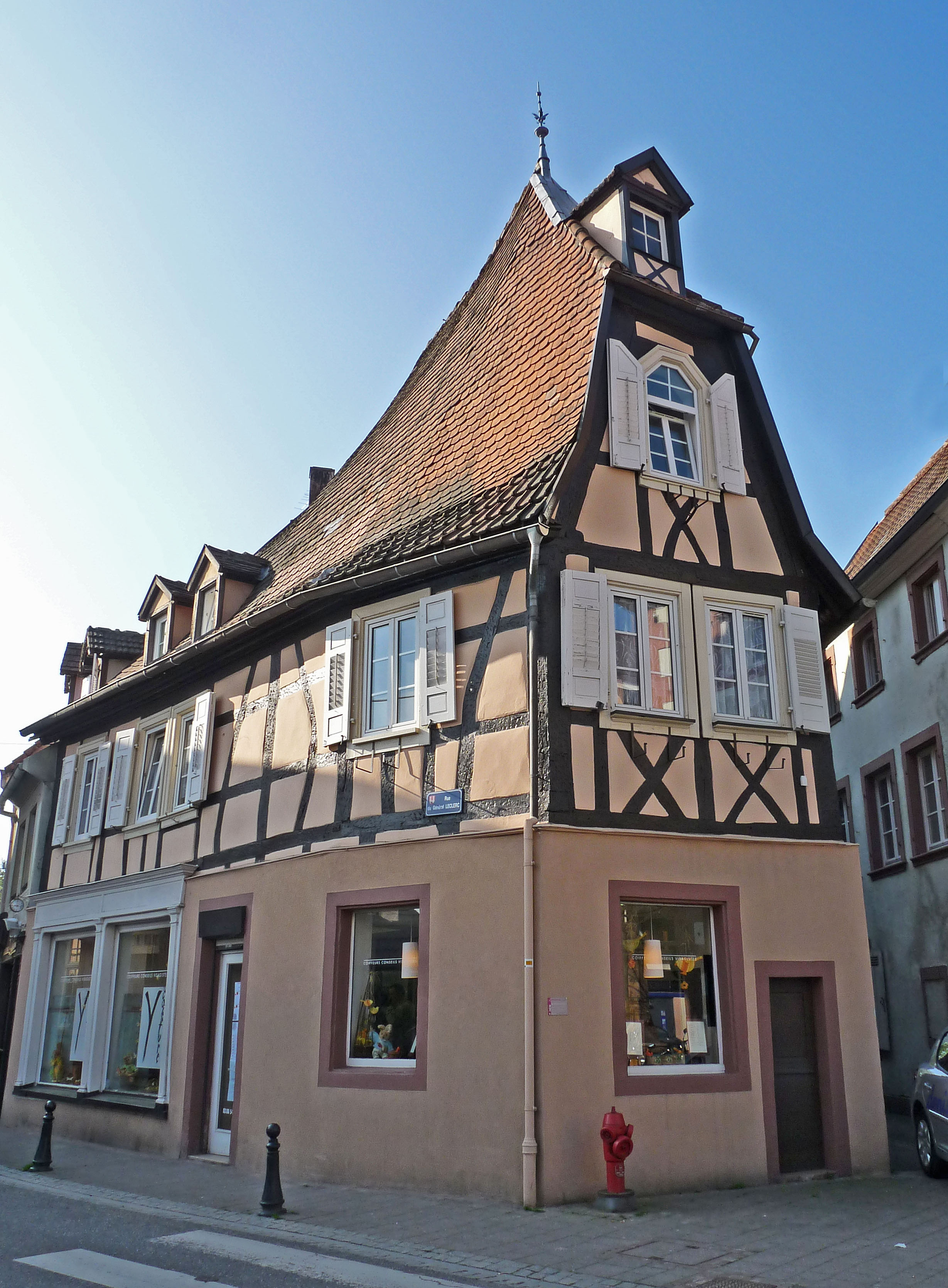 Wissembourg (Bas-Rhin) : maison natale de Mgr Charles Marbach, 2 rue du Général-Leclerc ; place du Marché-aux-Choux, XVIIIe siècle